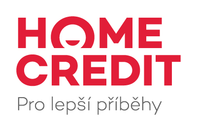 Logo společnosti Home Credit